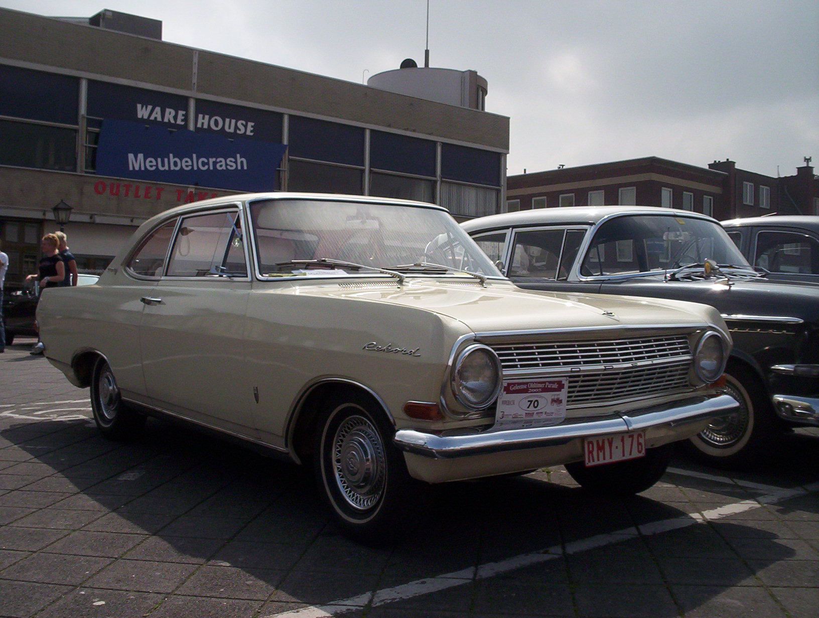 Afbeelding Opel Rekord A Coupe. Gefotografeerd te Nederland door JM Janssen